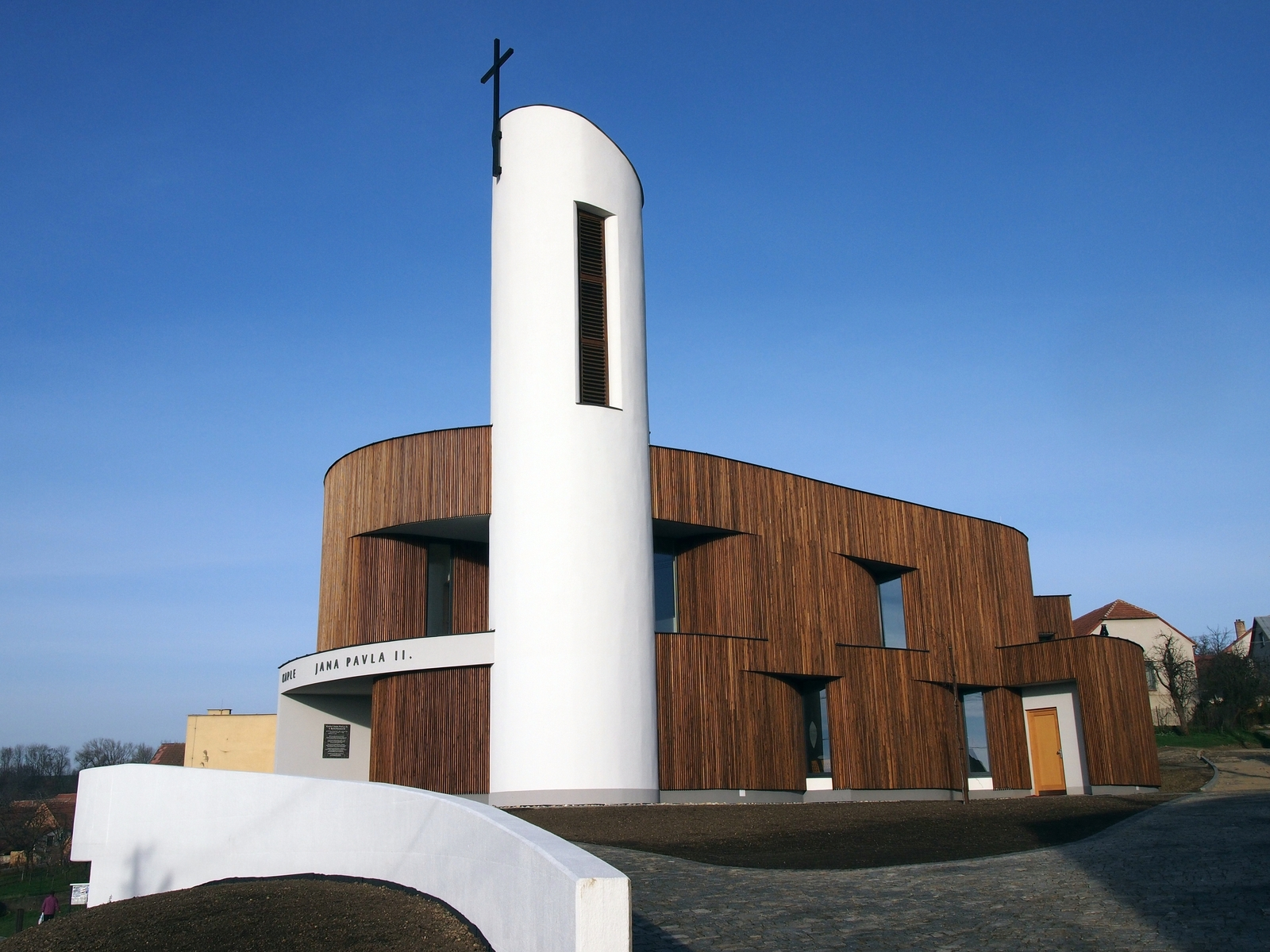 Fotografie Kaple Jana Pavla II. byla pořízena krátce po jeho vysvěcení v roce 2013. Jde o první svatostánek v obci Bukovany, ležící nedaleko jihomoravského Kyjova.